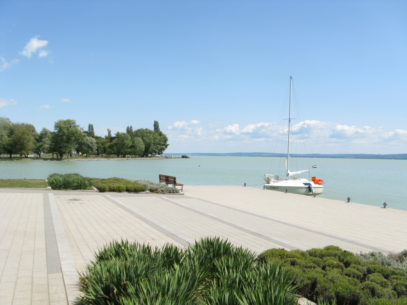 Vaade Balatoni järvele. Ülesvõte tehtud Révfülöpis Ungaris.